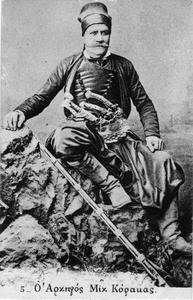 Гръцкият андартски капитан Михаил Теодору Коракас.